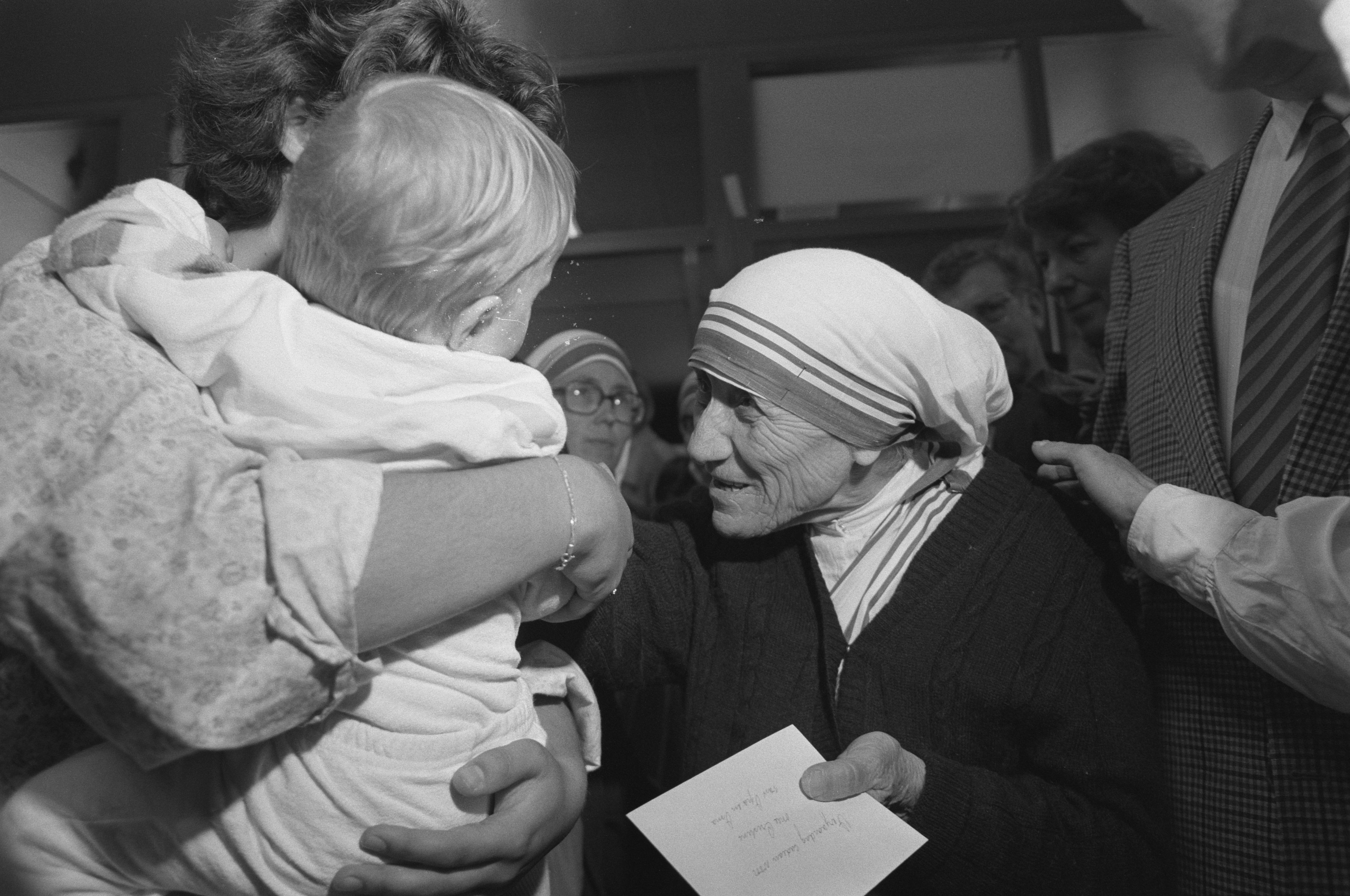 Collectie / Archief : Fotocollectie Anefo Reportage / Serie : [ onbekend ] Beschrijving : Bijeenkomst Contact Rooms Katholieken in Utrecht; Moeder Teresa met kind Datum : 11 juni 1988 Locatie : Utrecht Trefwoorden : bijeenkomsten Persoonsnaam : Moeder Teresa Fotograaf : Croes, Rob C. / Anefo Auteursrechthebbende : Nationaal Archief Materiaalsoort : Negatief (zwart/wit) Nummer archiefinventaris : bekijk toegang 2.24.01.05 Bestanddeelnummer : 934-2639